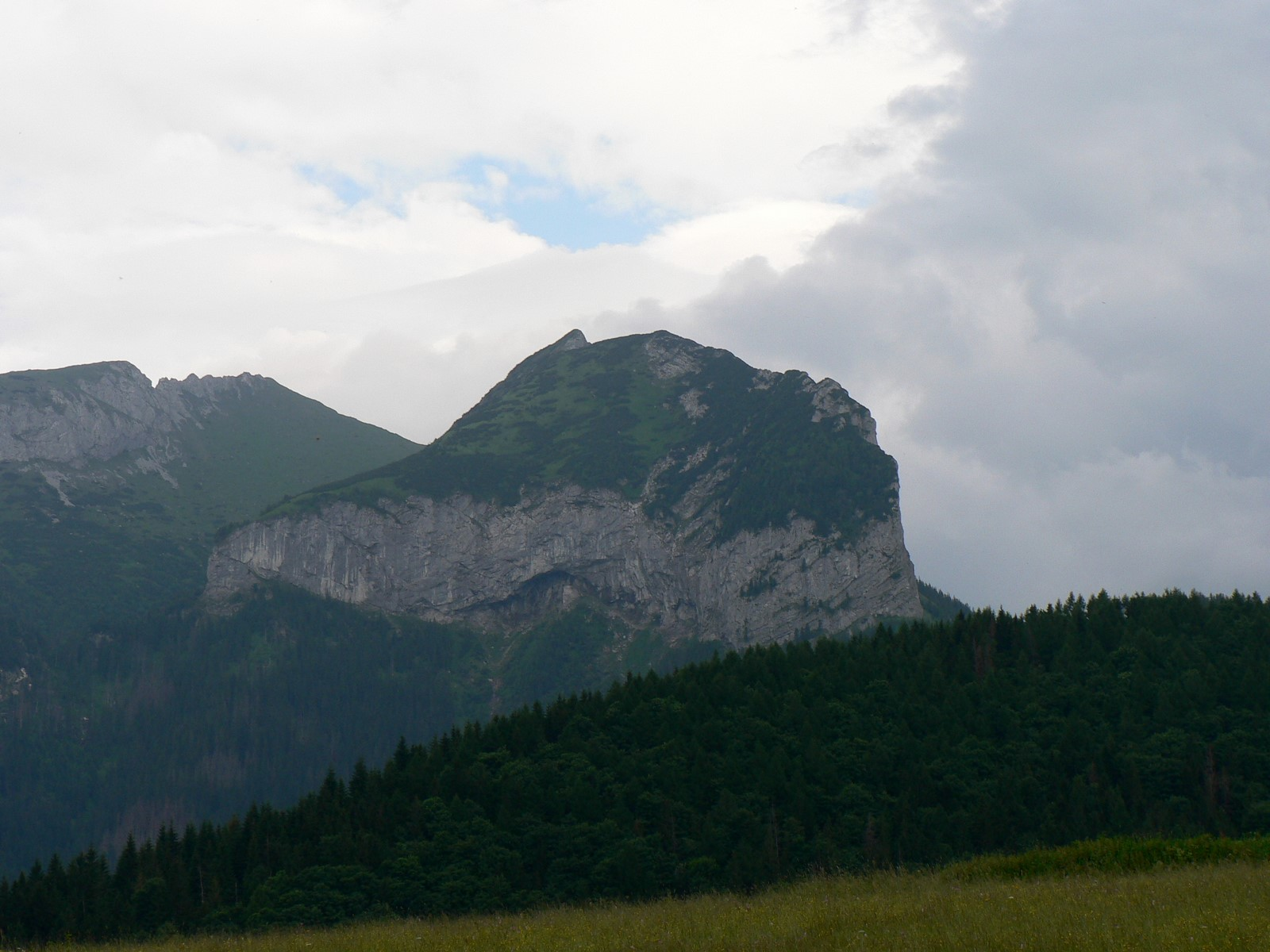 Murań z Jaworzyny Spiskiej, po lewej Nowy Wierch